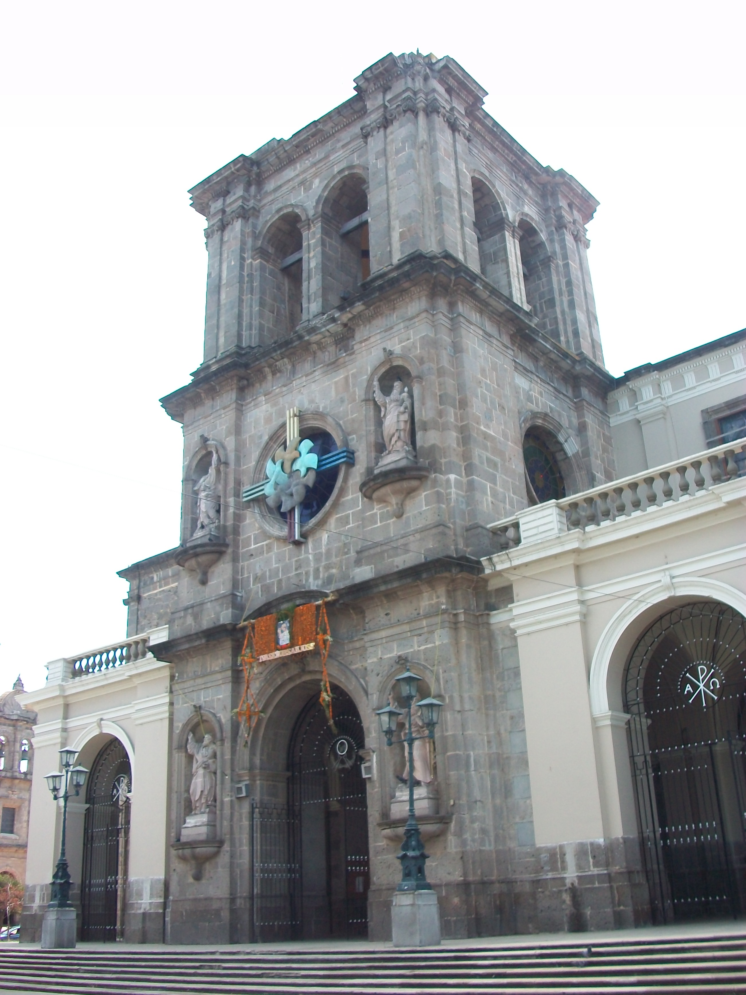 Catedral de San José. Ciudad Guzmán, Zapotlán el Grande, Jalisco.